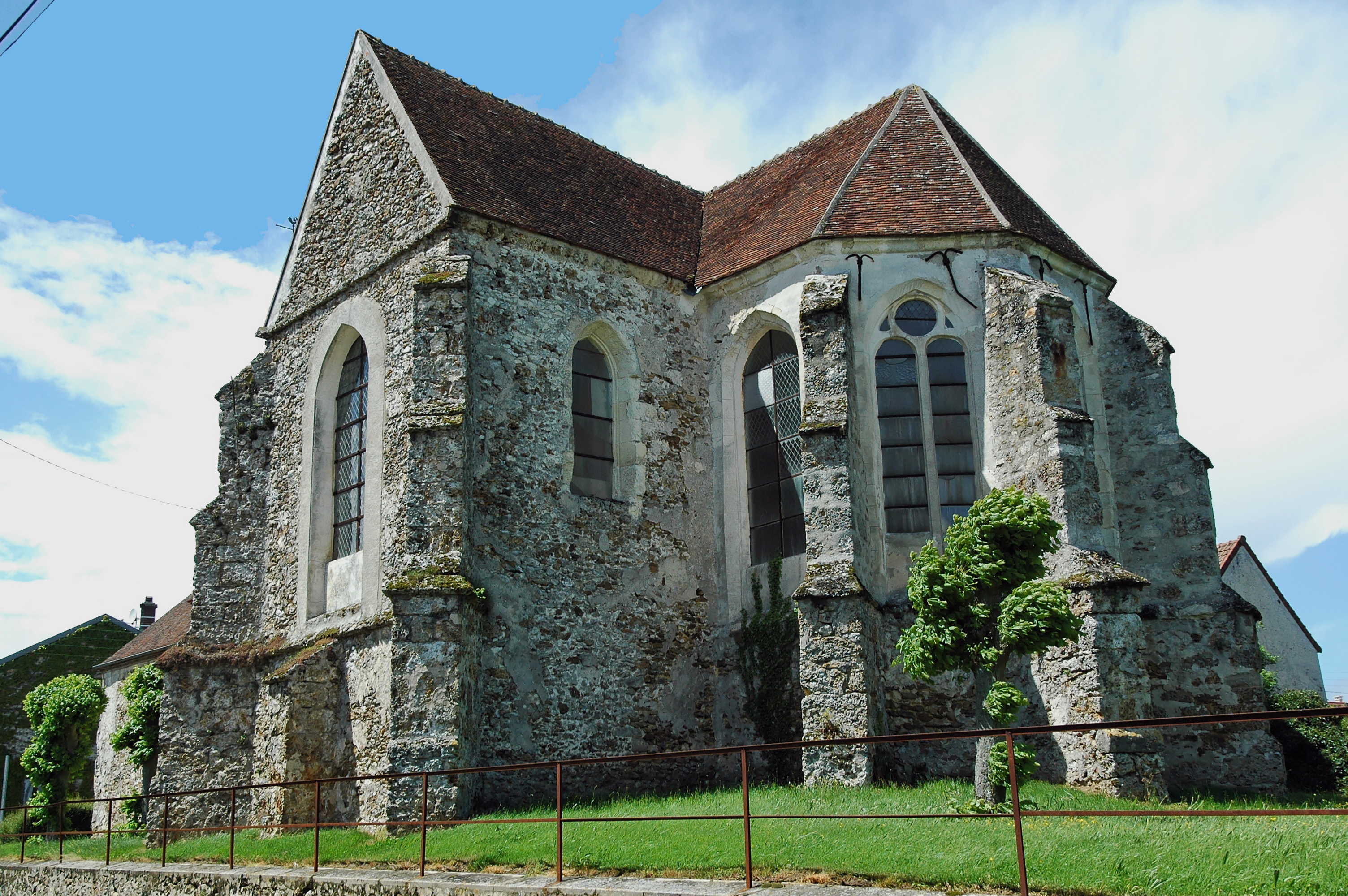 Absite de l'église de Fontenelle-en-Brie.